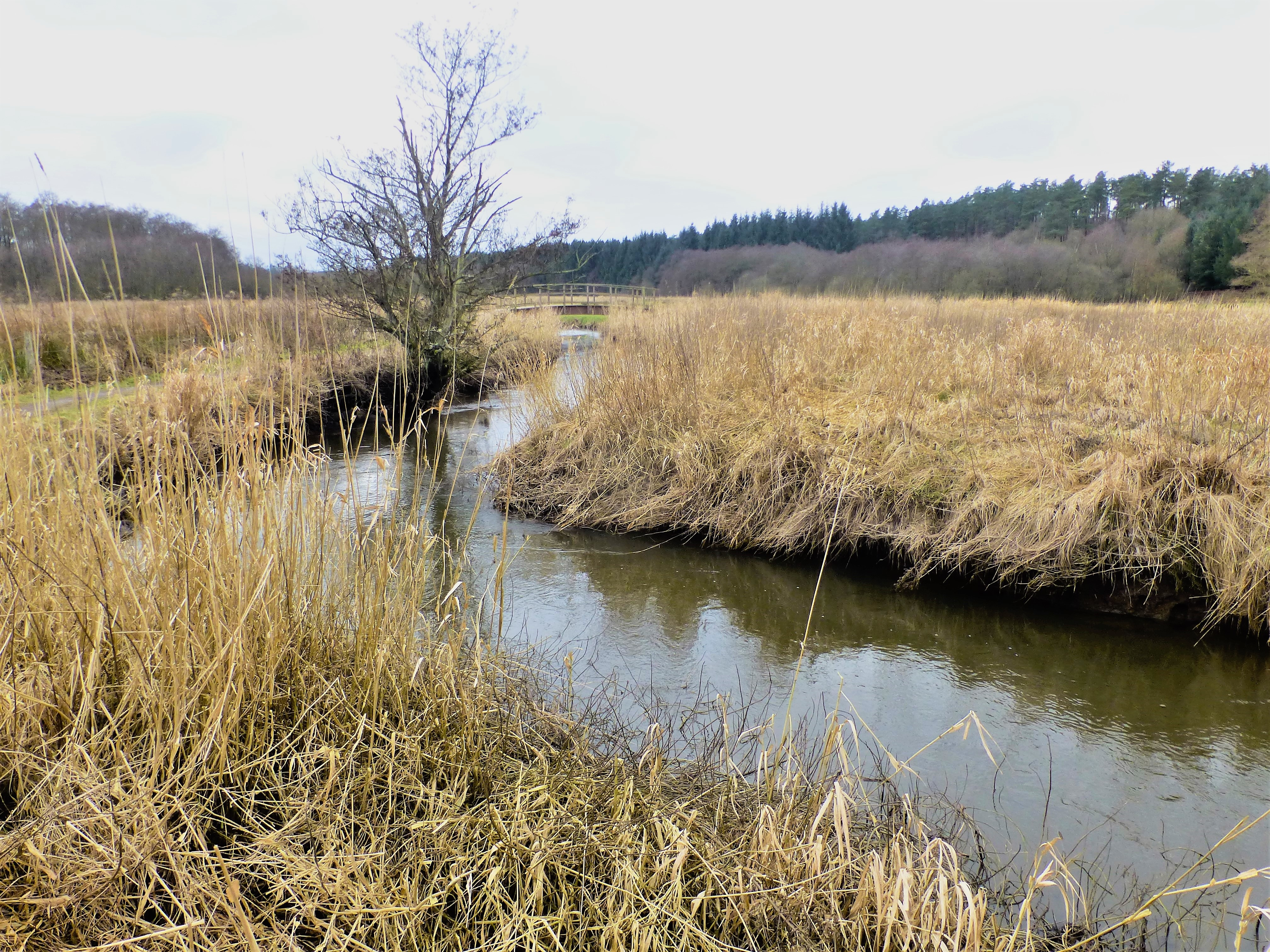 Gjern Å i engene øst for Sminge